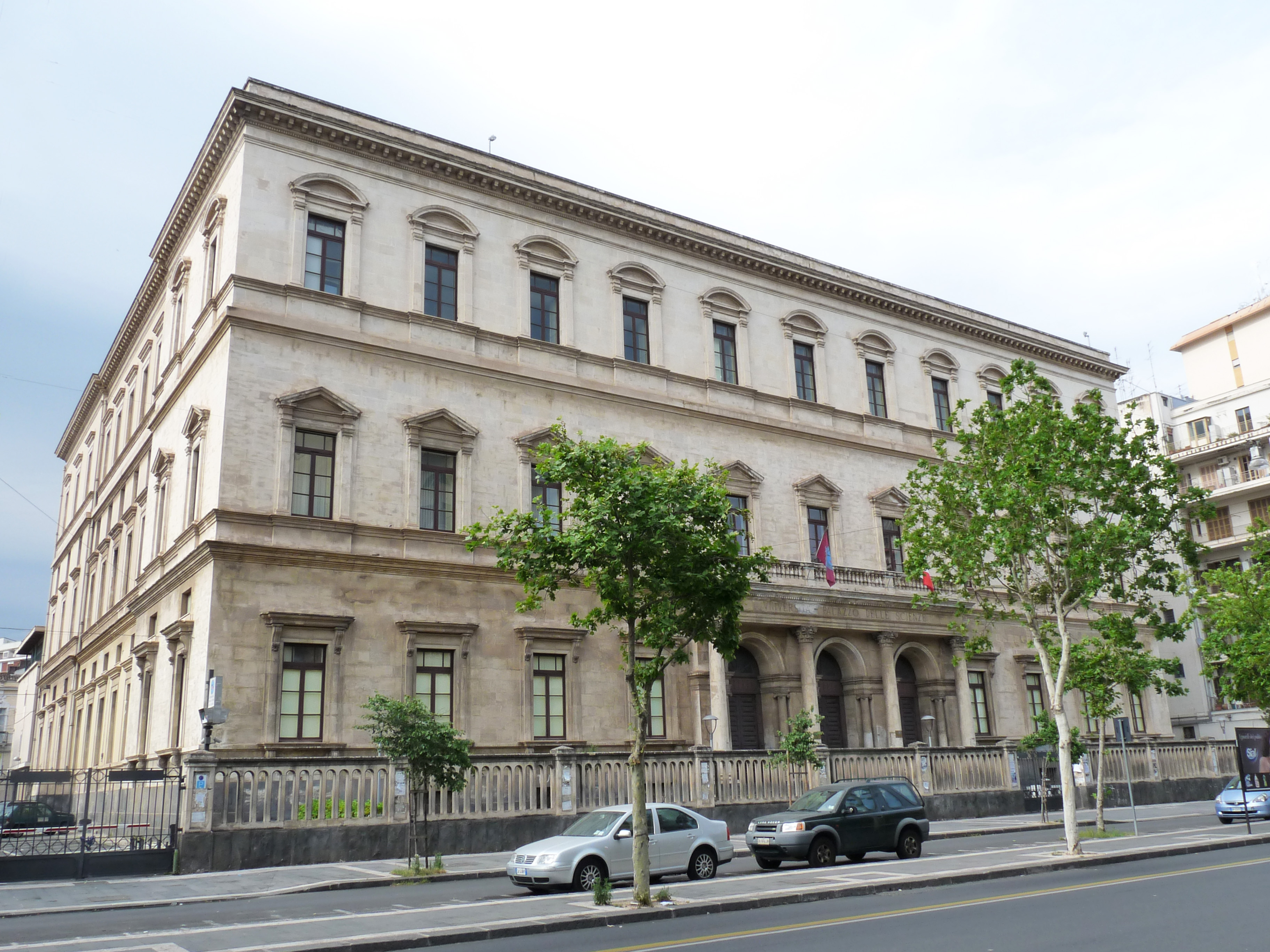 Palazzo delle Scienze (Corso Italia 55, Catane, Sicile, Italie) : abrite la Faculté d'Economie, une composante de l'Université de Catane.